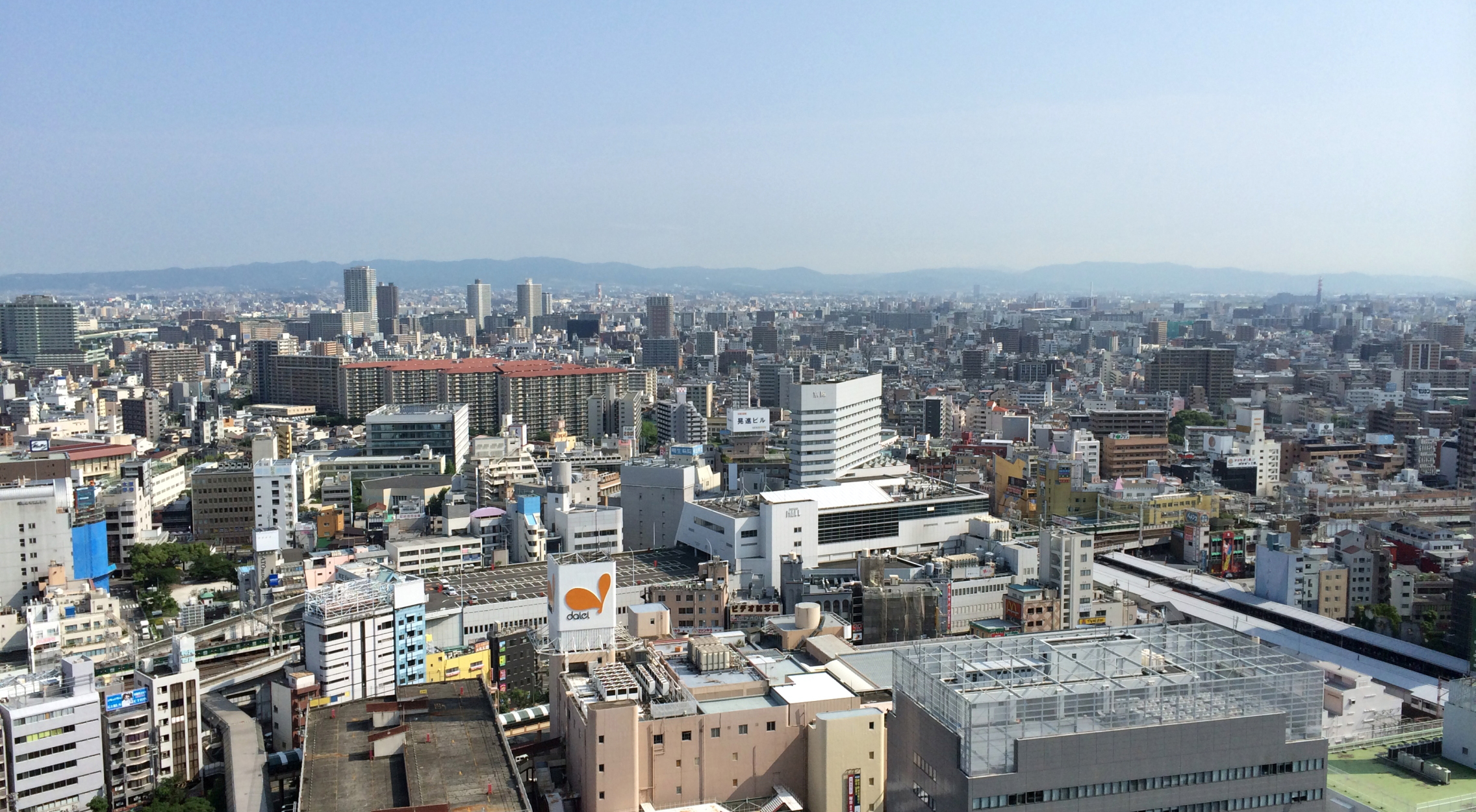 Miyakojima Ward Skyline